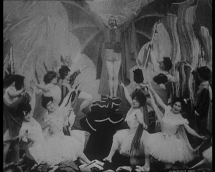 Image tirée du film "Faust aux enfers" de George Méliès (1903). Scène finale se déroulant aux Enfers, lorsque Méphisto surgit du sous-sol et déploie de larges ailes de chauve-souris, au milieu de la liesse générale.